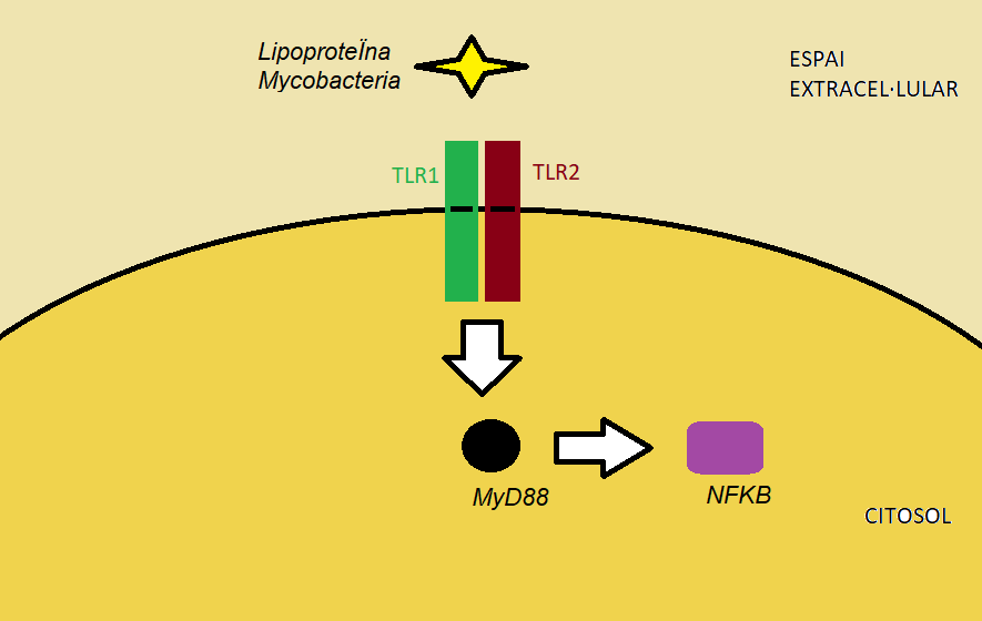 Esquema de la participiació del TLR1 en la resposta inflamatòria